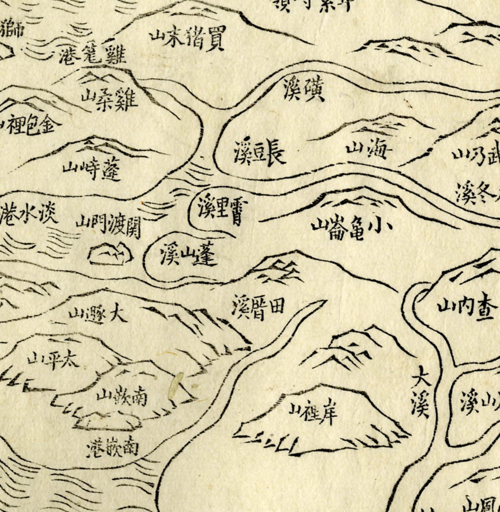 可以在圖中看見南崁、大溪等桃園歷史地名。